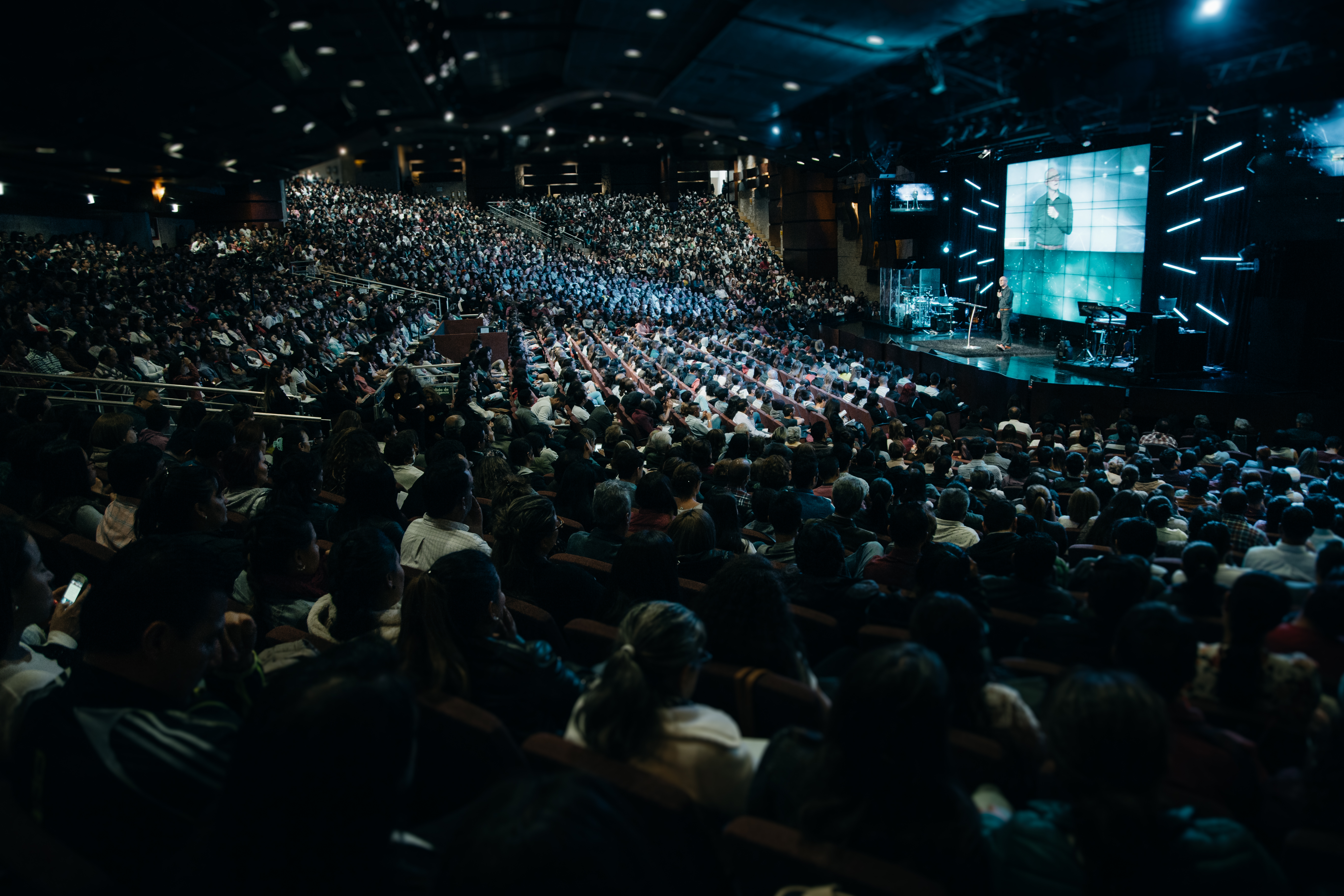 Culto en El Lugar de Su Presencia, durante una prédica.